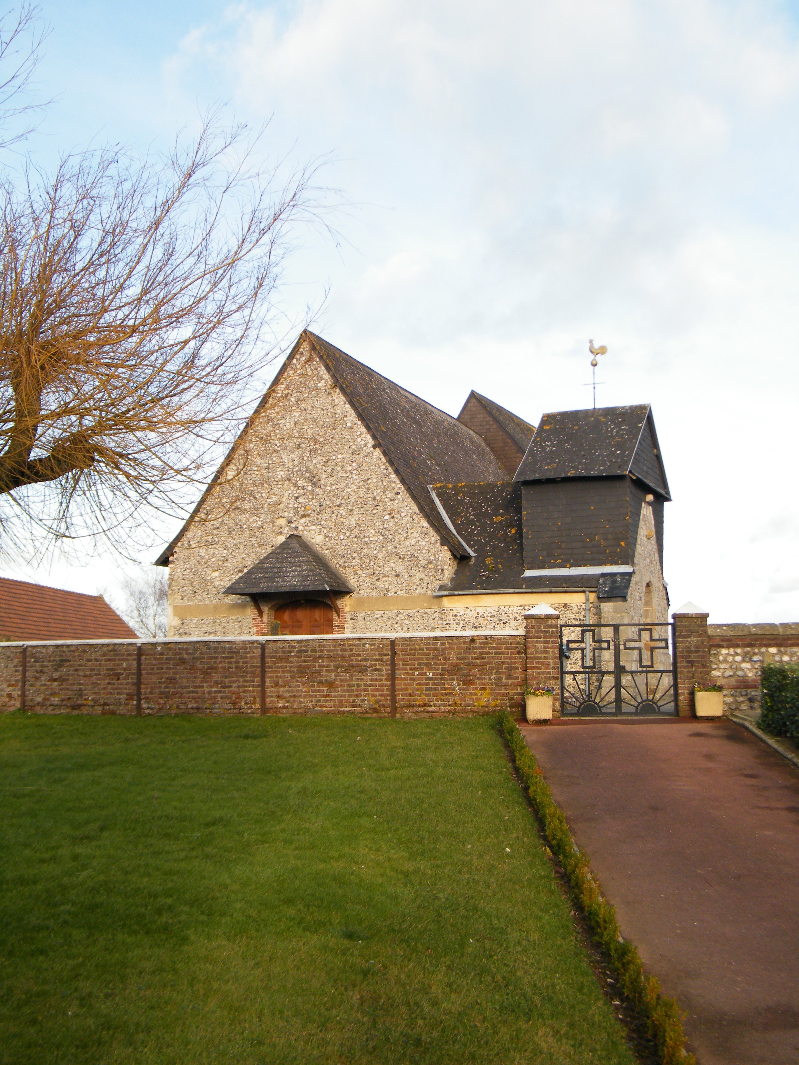 église.